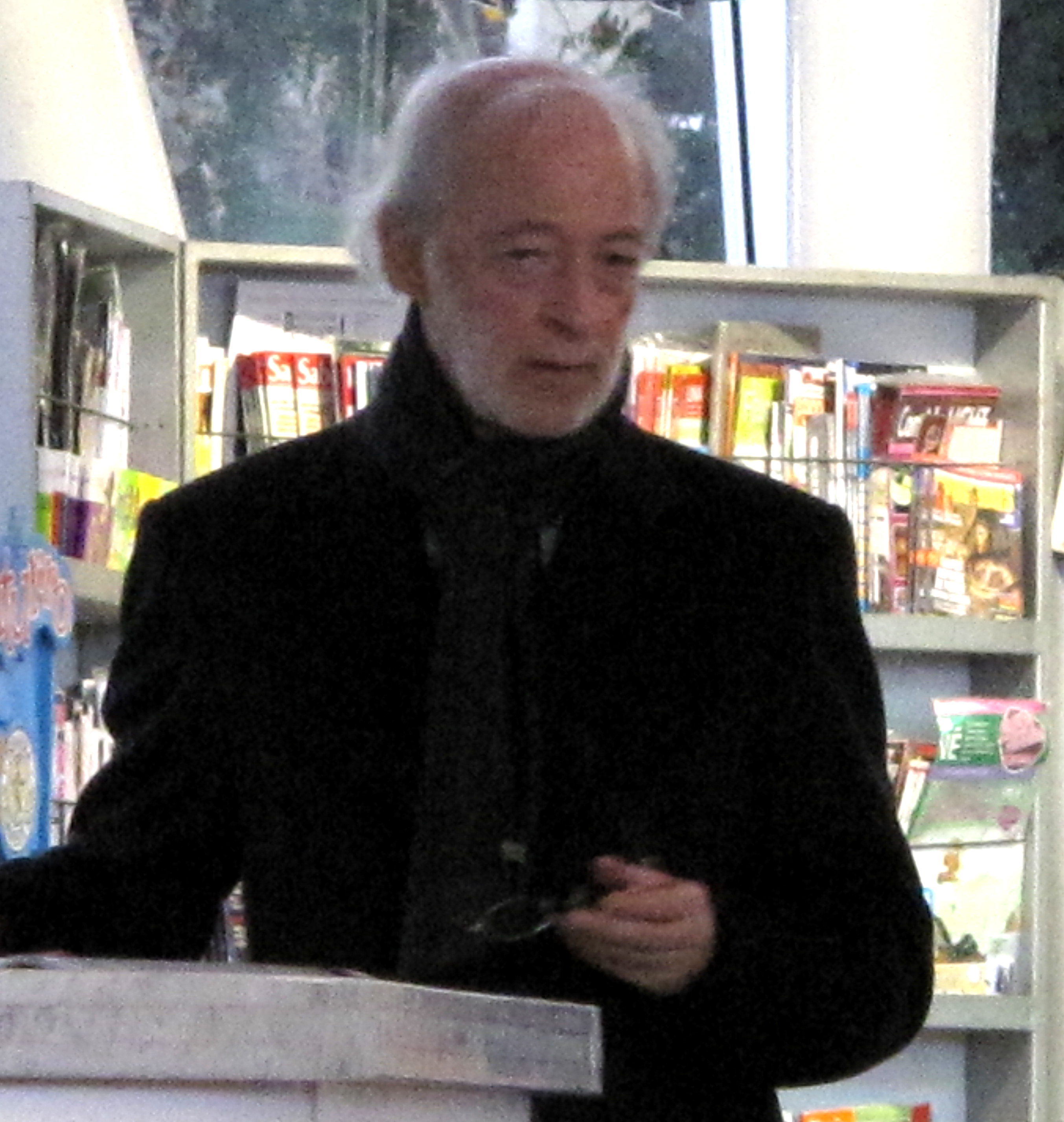 Juan Carlos López Mena en 2014